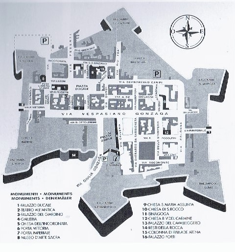 Abstrahierte Nachzeichnung eines älteren Plans der Stadt, gut erkenntlich ist der wehrhaft nach außen hin angelegte Grundriss